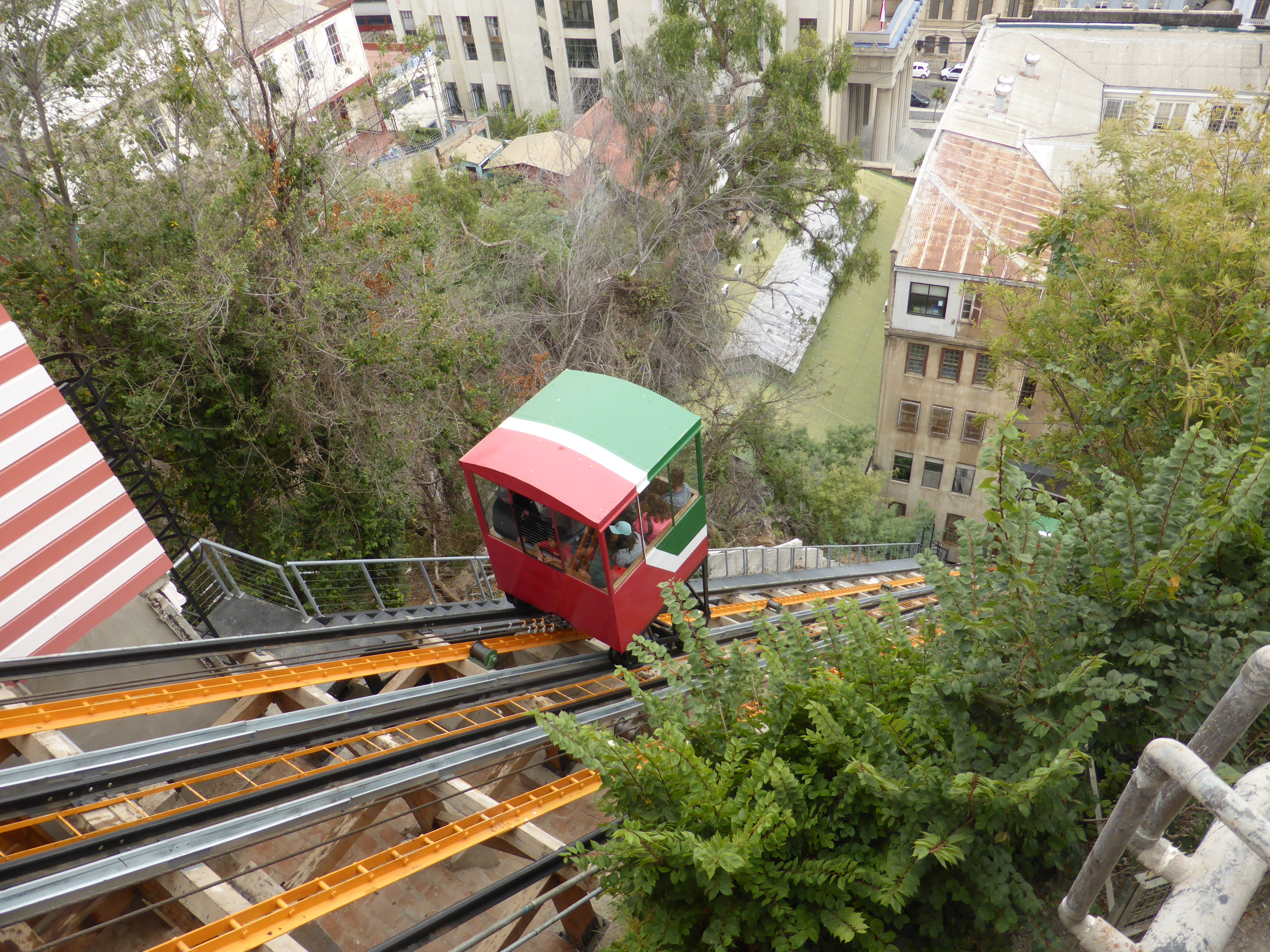 El ascensor El Peral es un funicular que sube al Cerro Alegre, de Valparaíso. Es del año 1902. Es un Monumento Histórico. Fue restaurado en 2016. La foto está tomada desde el Paseo Yugoslavo.